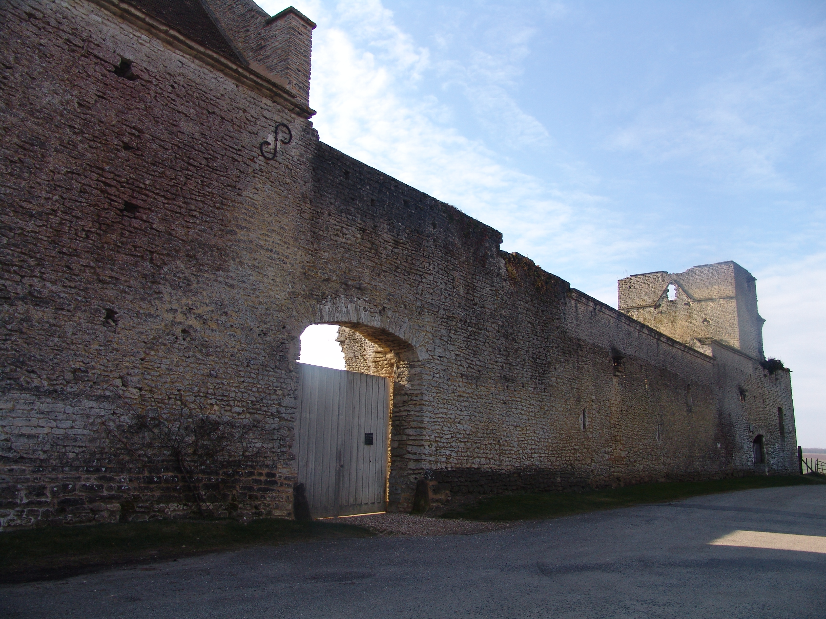 Entrée du fort